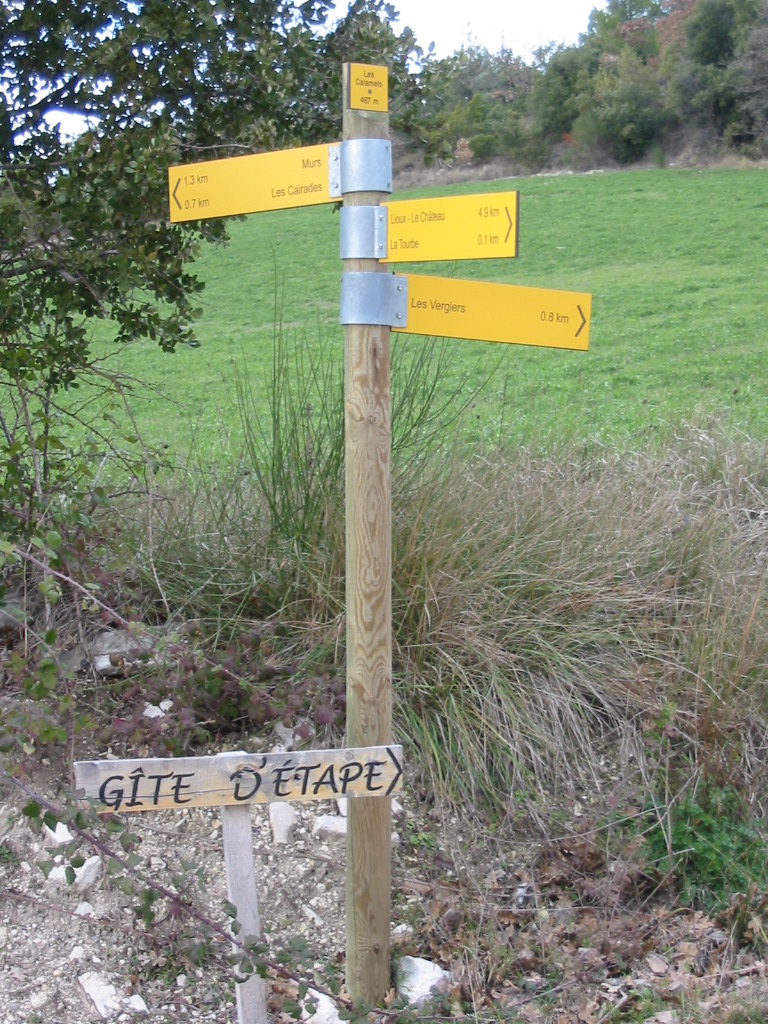 Panneaux de randonnée à Murs